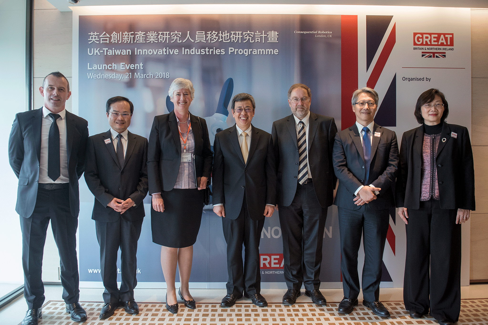 03.21 副總統出席「臺英科學與創新合作發表」與慶祝活動，與英國在臺辦事處唐凱琳代表、英國外交部首席科學顧問葛林姆斯、科技部次長鄒幼涵、中央研究院院長廖俊智及工業技術研究院副院長劉軍廷等人合影